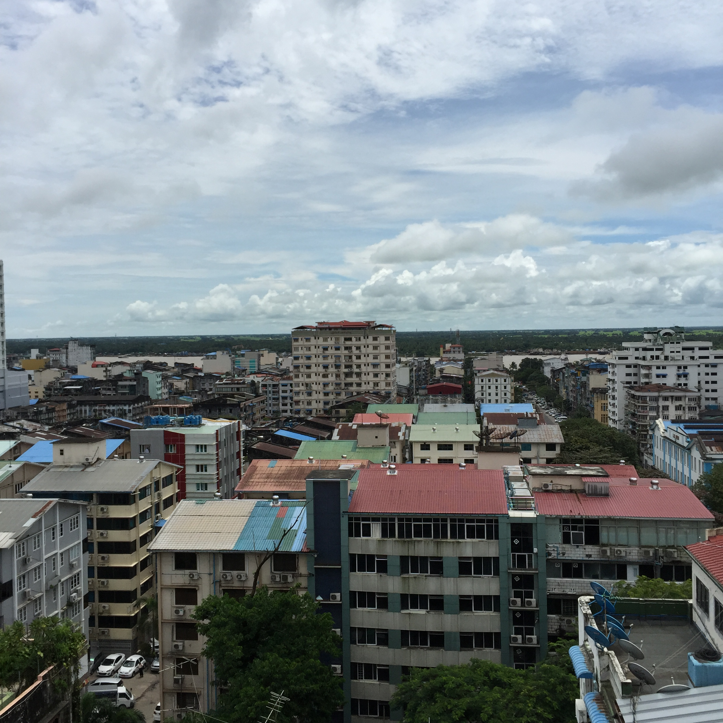 Lanmadaw, Yangon, Myanmar (Burma)